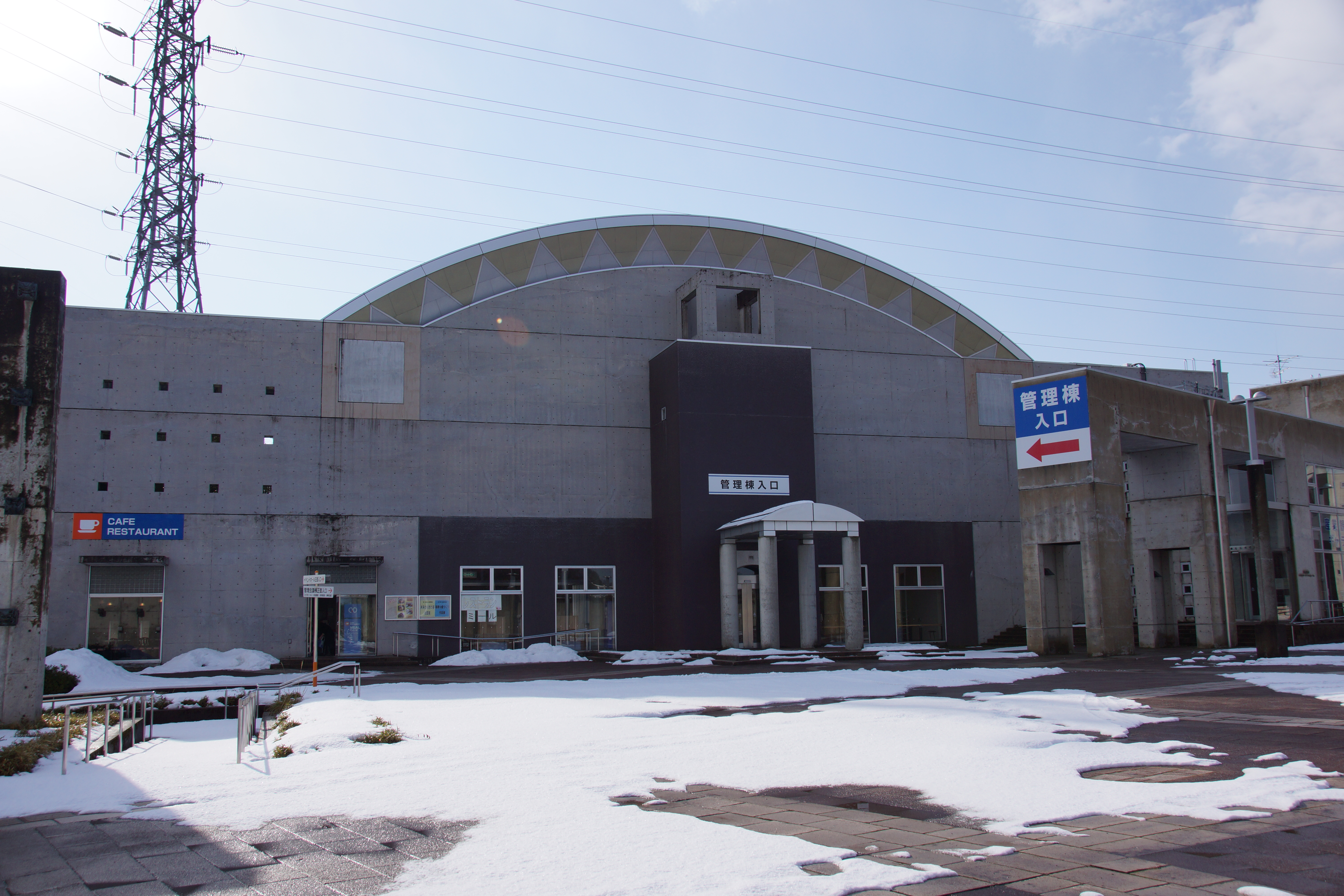 福井県鯖江市/武生市に所在する屋内競技施設、福井県産業振興施設（サンドーム福井）の管理会議棟。作者撮影。